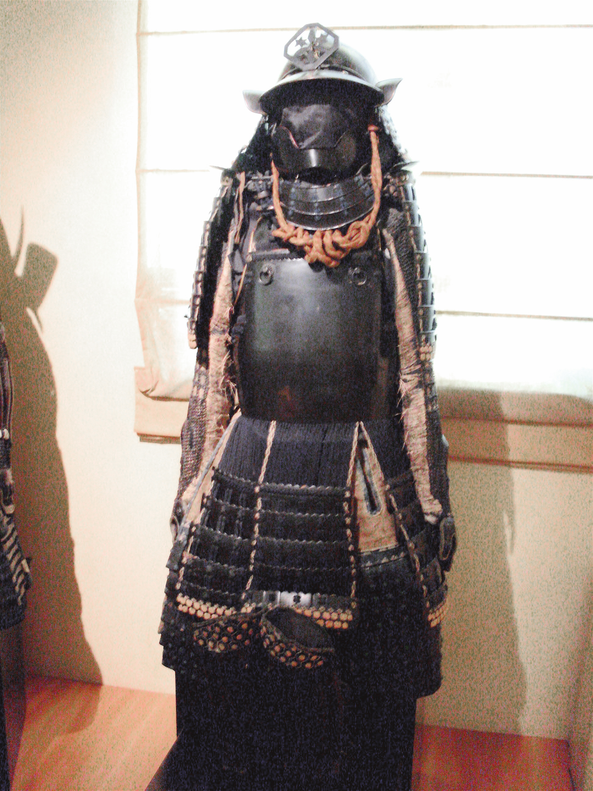 Armure de la période Edo. Musée George Labit, Toulouse, France